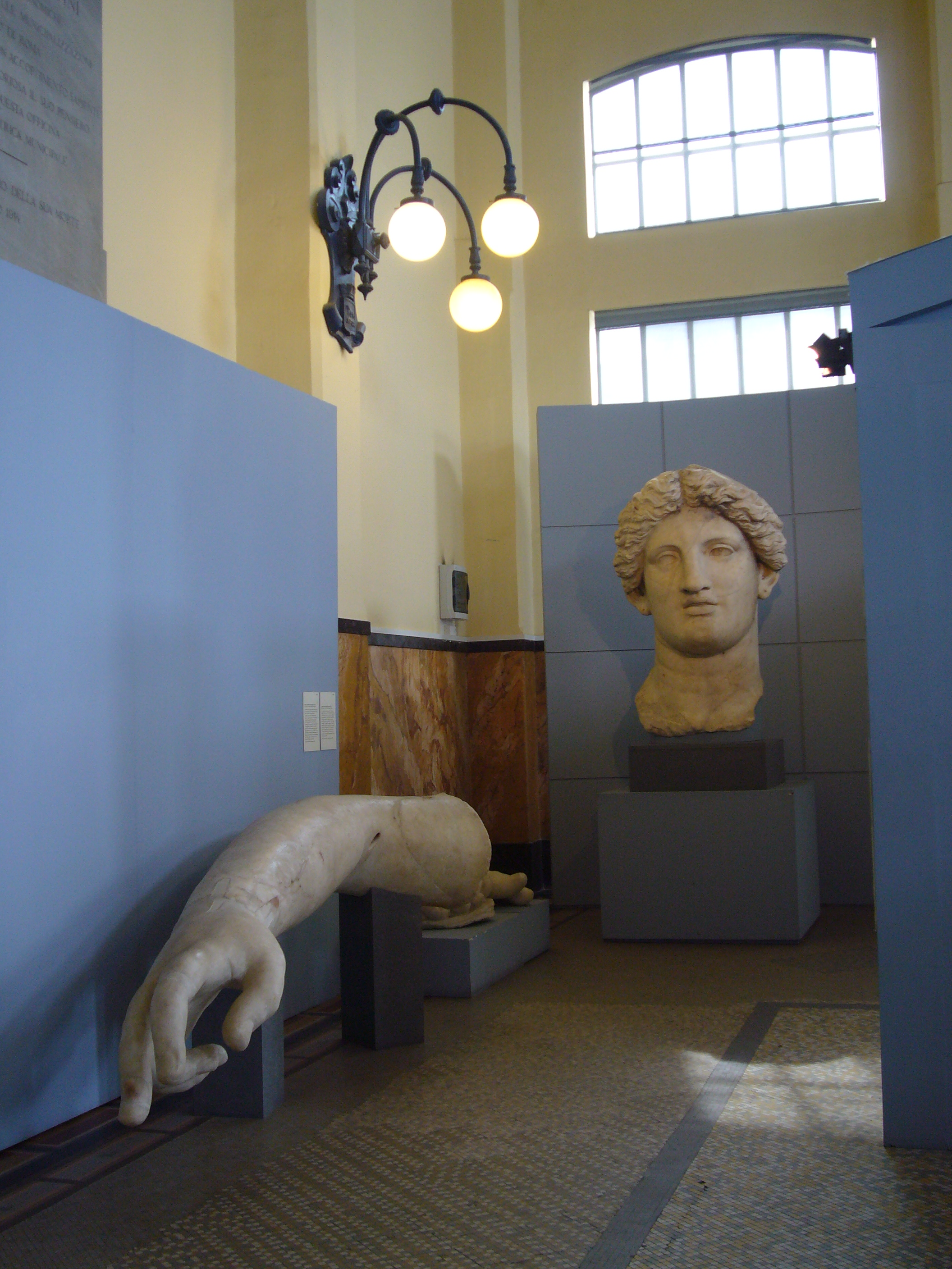 Roma, Centrale Montemartini: Fortuna huiusce diei ttesta e braccio di acrolito trovati nell'Area sacra di largo Argentina (1929)